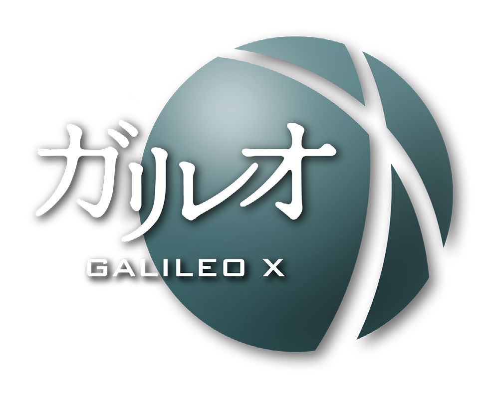 ガリレオXのロゴ